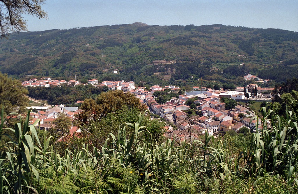 Monchique View from Convento